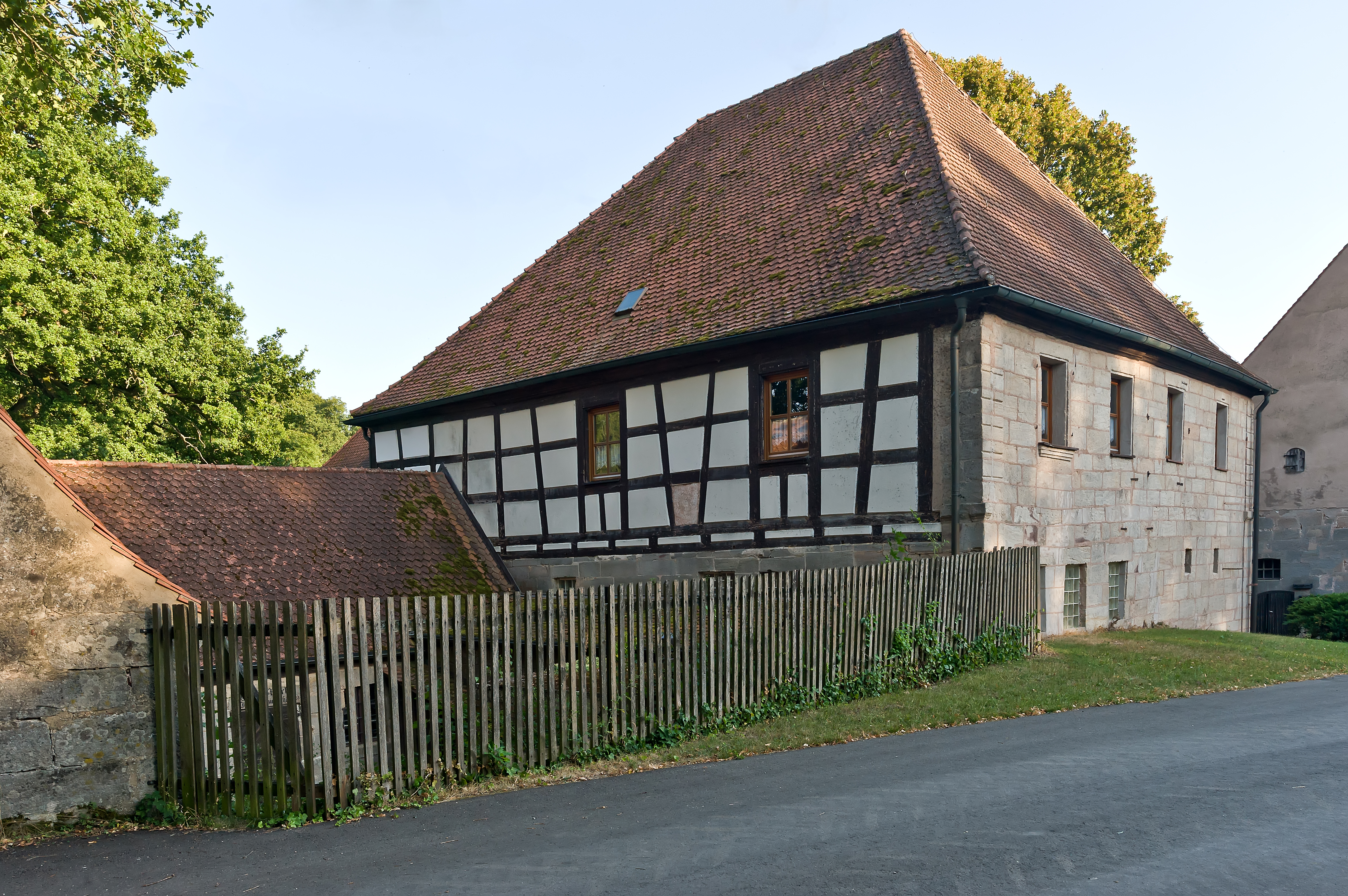 Hammerschmiede, Langenzenn, Cadolzburg This is a photograph of an architectural monument.